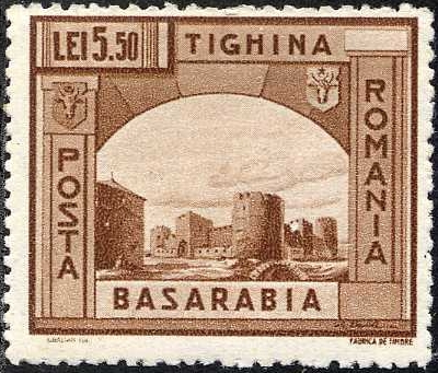 Cetatea Tighina reprezentată pe o marcă poştală emisă in 1941 de Poşta Română cu ocazia eliberării Basarabiei